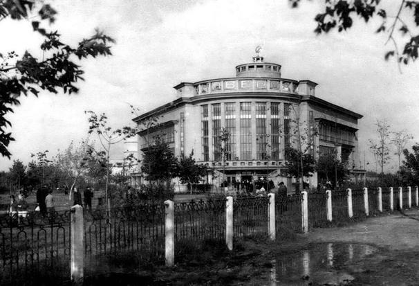 Горький. Автозаводский универмаг